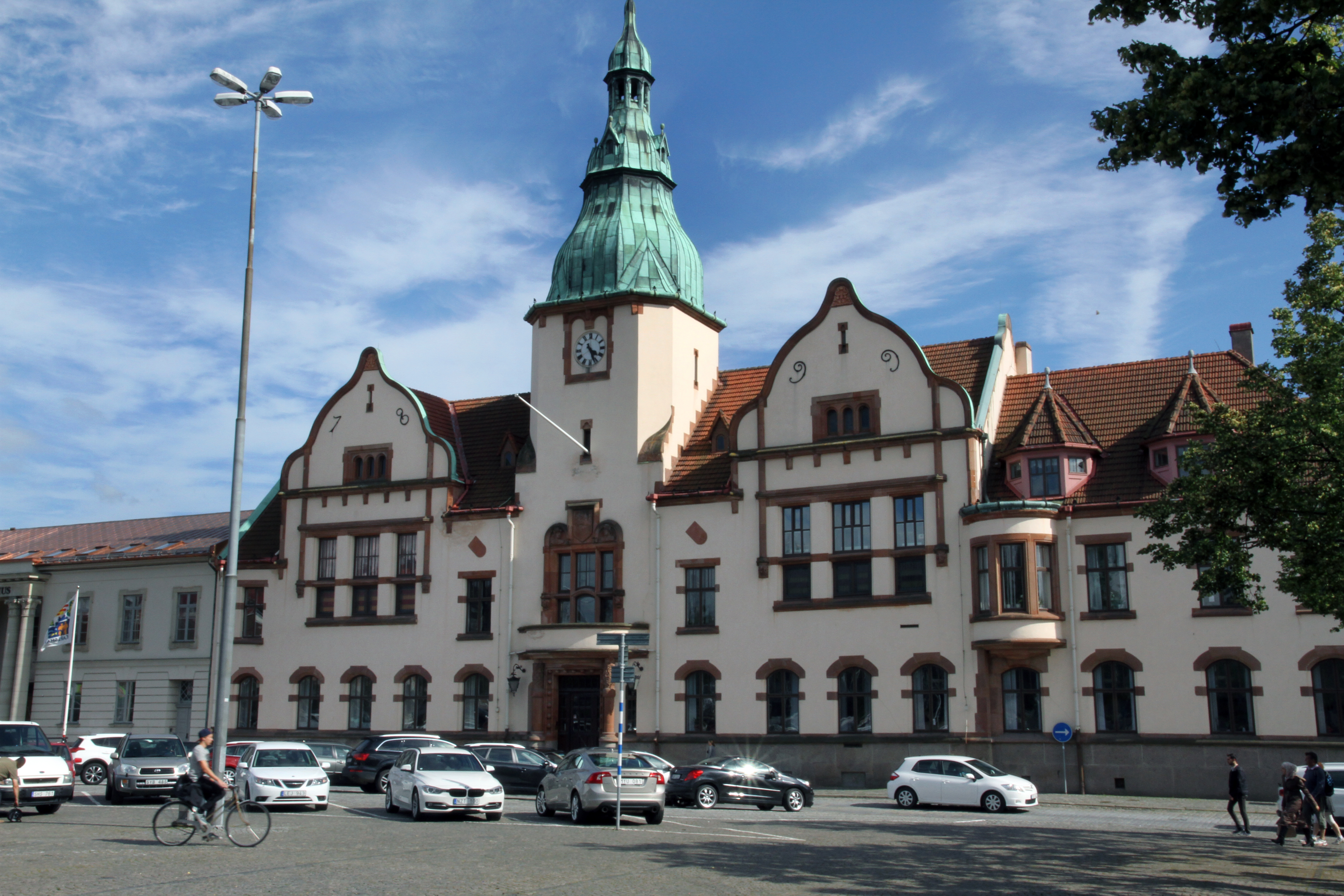 Karlshamns Rådhus 21 juli 2015